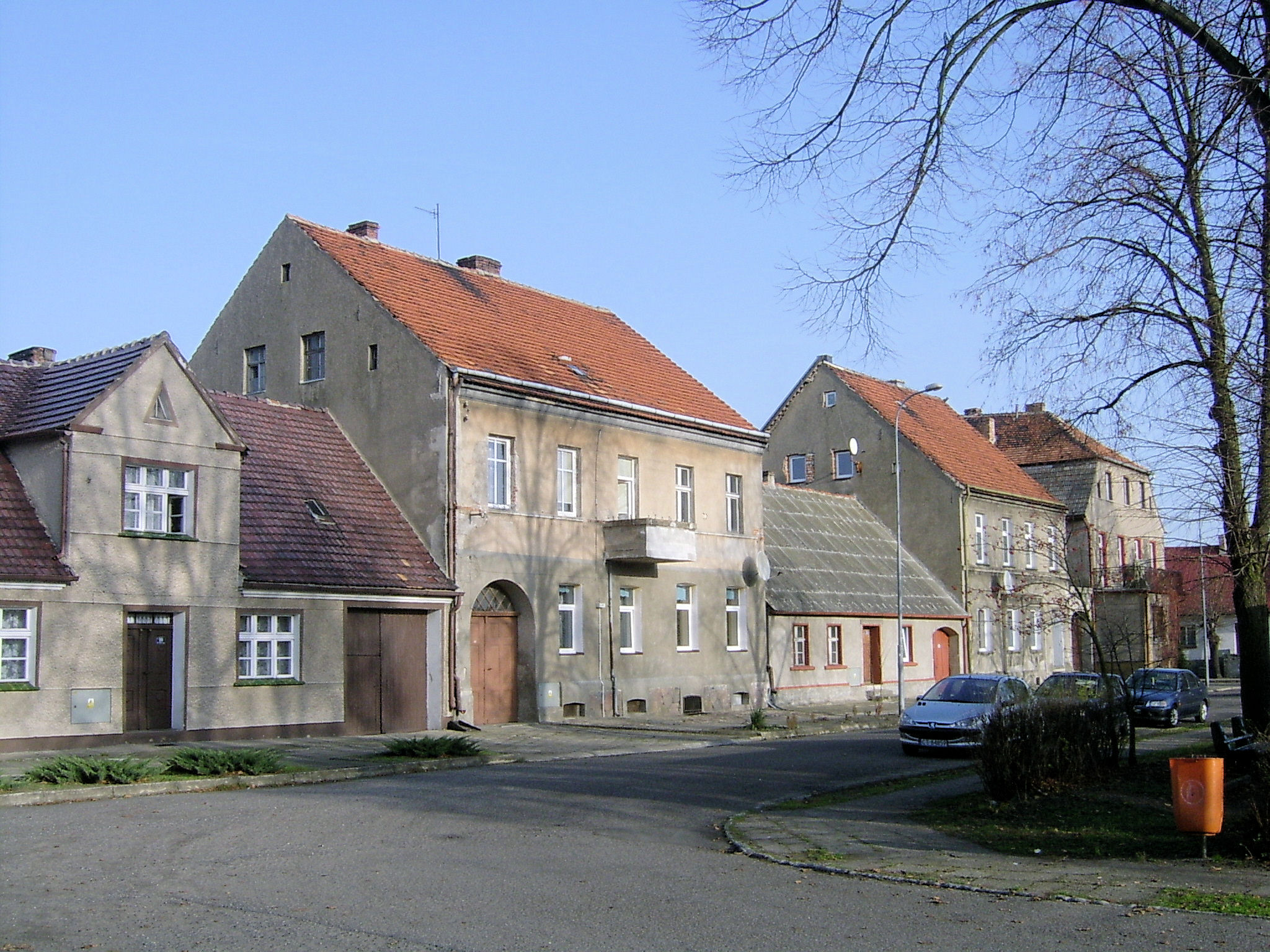 Brójce (gm. Trzciel, woj. lubuskie, Poland}